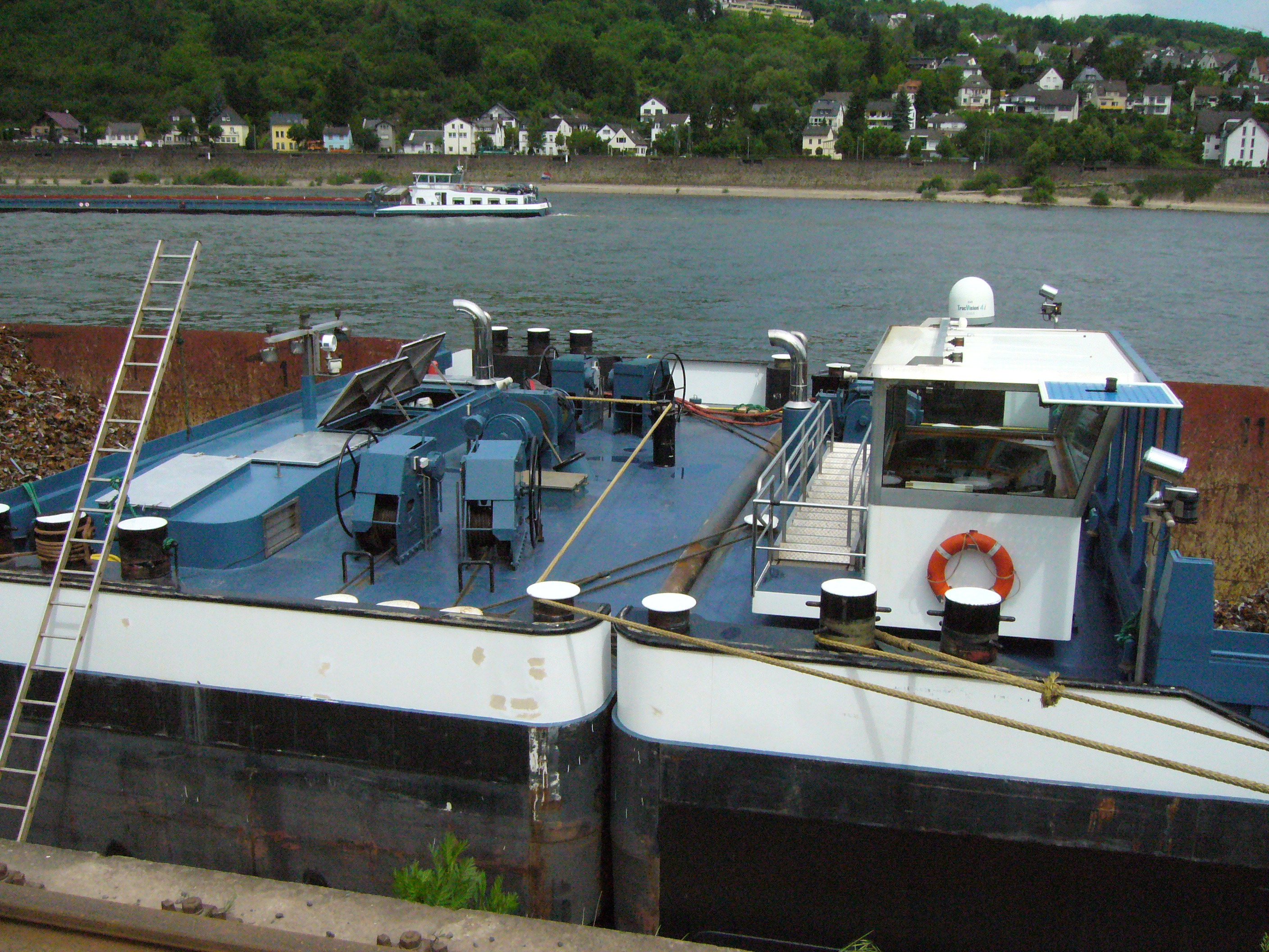 Koppelwinden